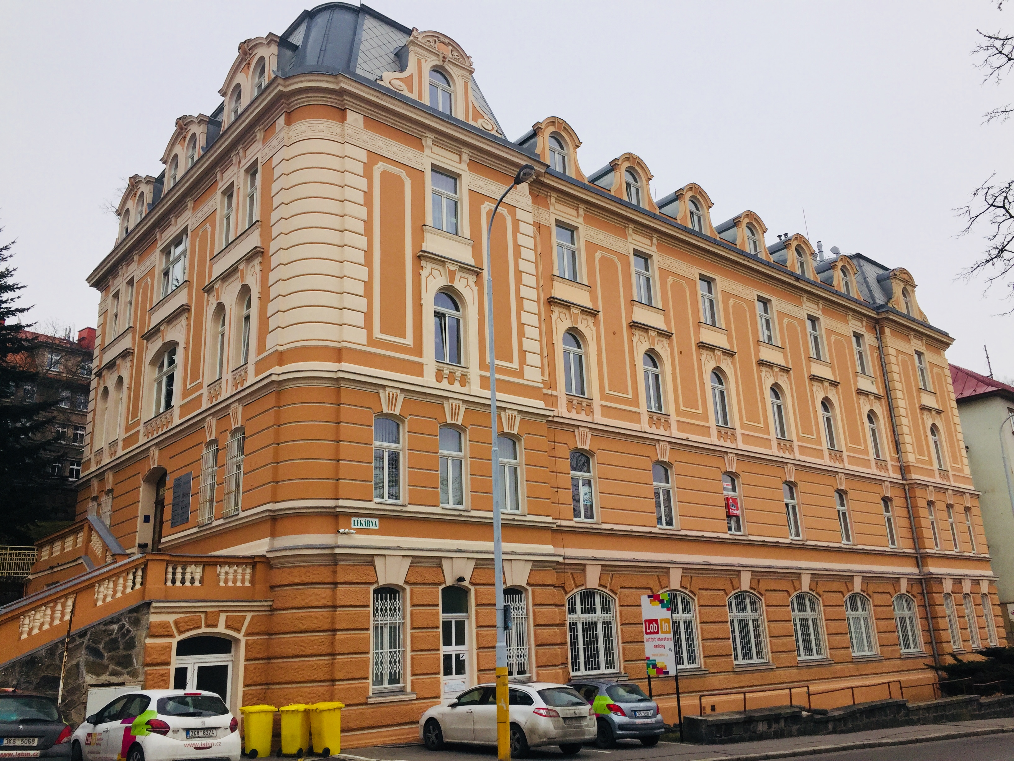 Das Kaiser Franz Josef-Regierungs-Jubiläums-Hospiz für arme Israeliten in Karlsbad, Bezručova 1098/10.